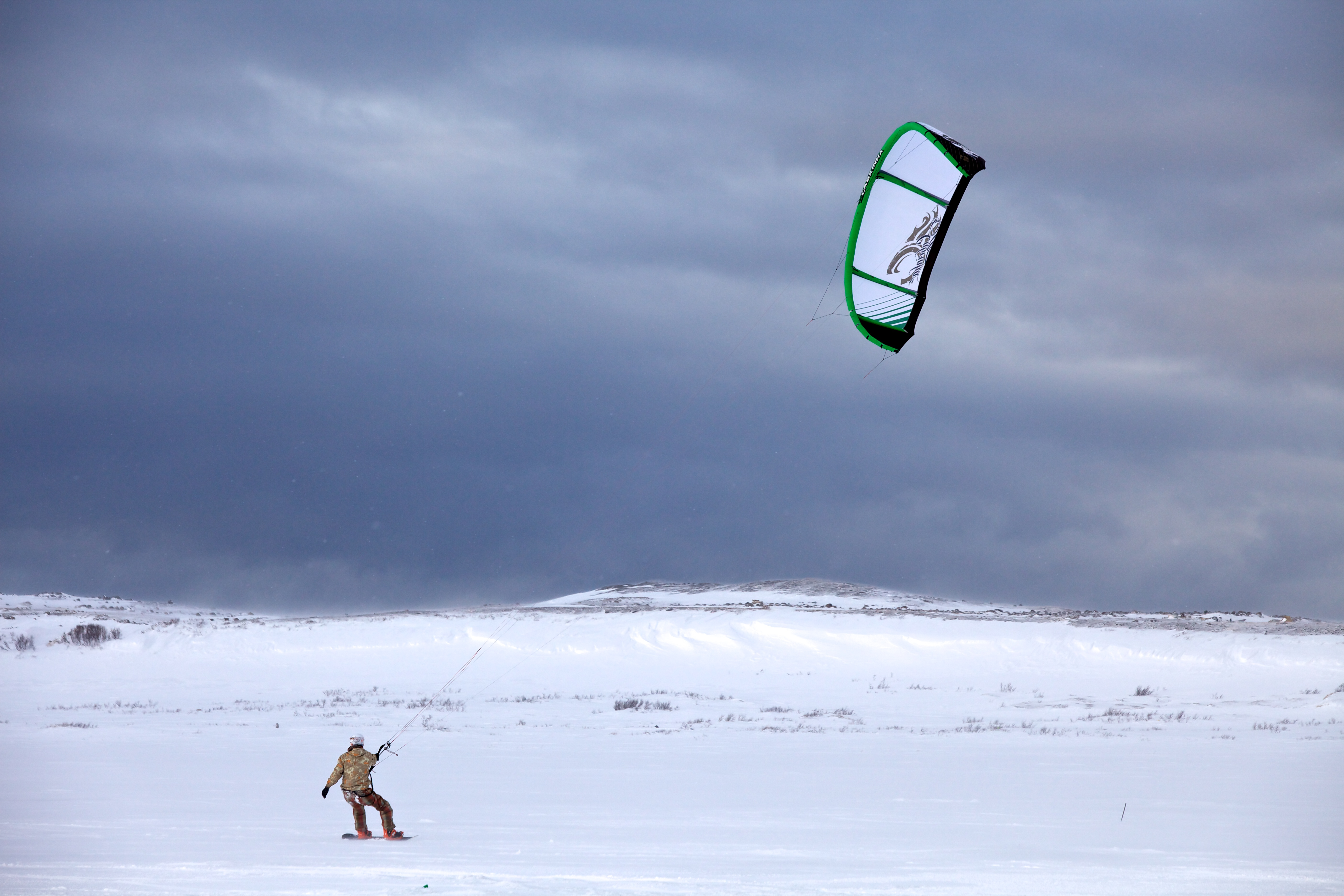 Кайтер в Териберке